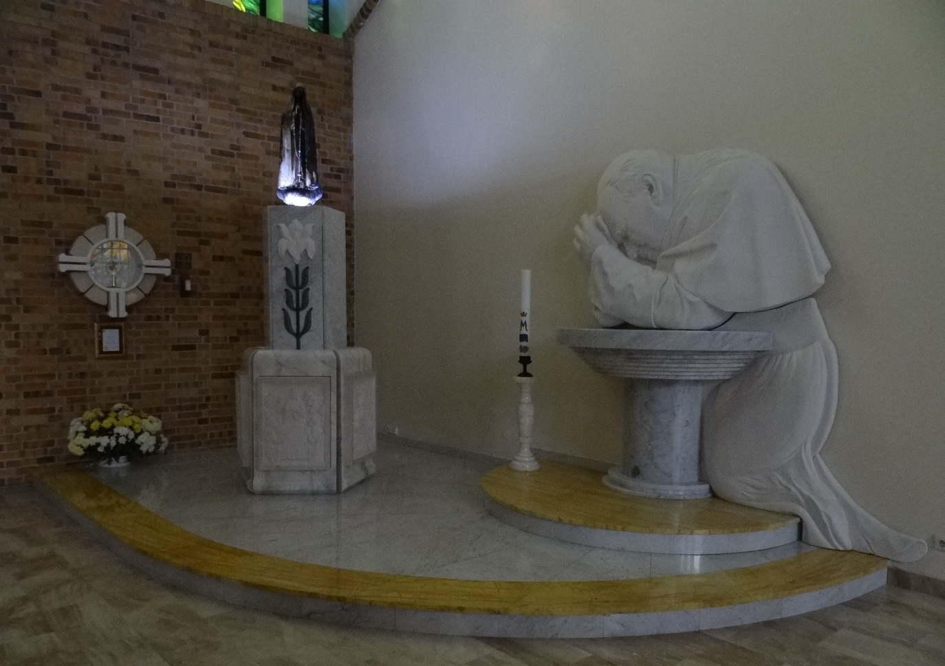 Kaplica Matki Bożej Fatimskiej Cierpiącej oraz płaskorzeźba św. Jana Pawła II